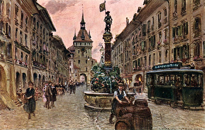 Painting by Georges Stein: Marktgasse mit Käfigturm, Bern